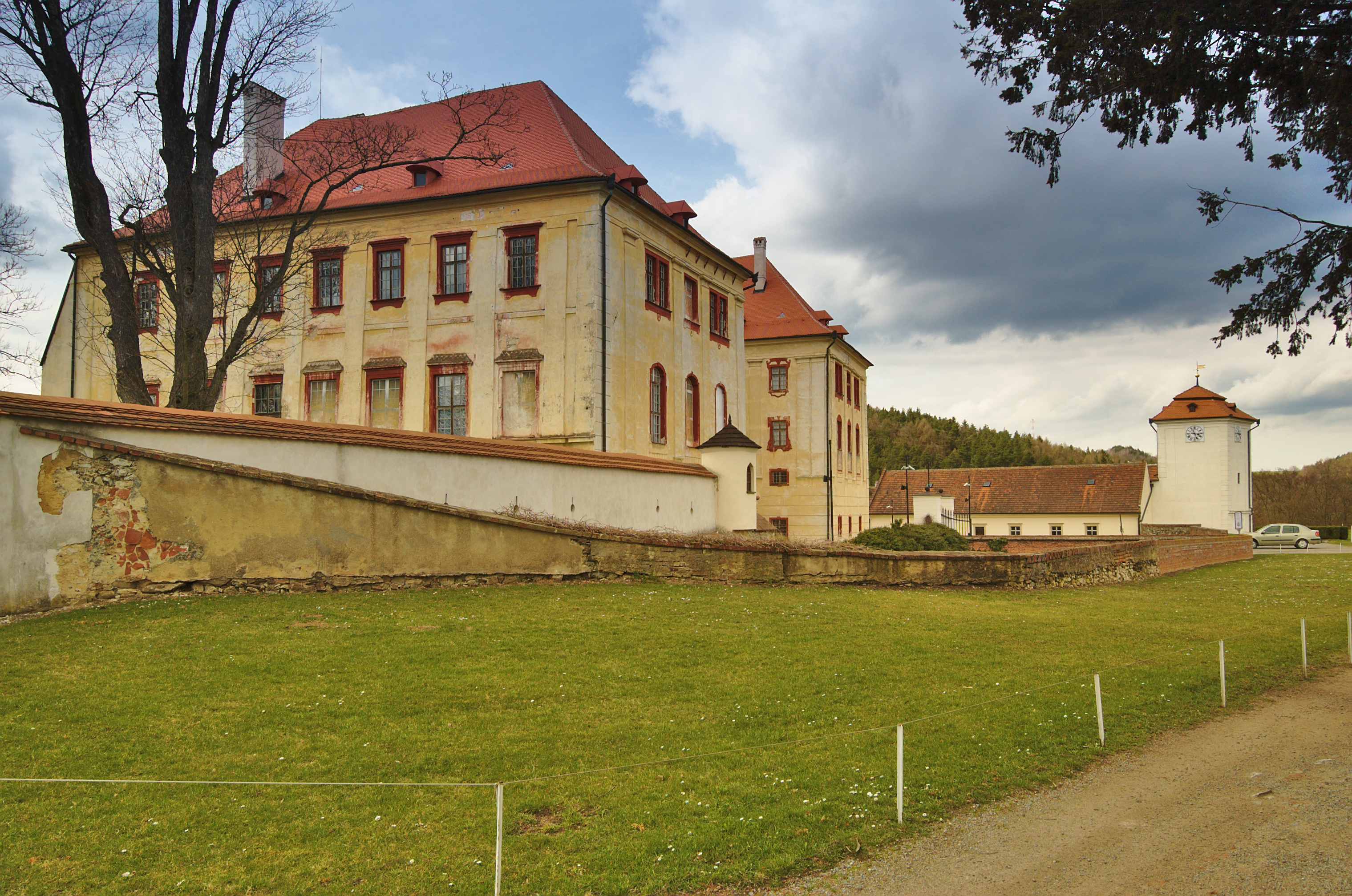 Zámek Kunštát, okres Blansko